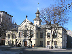 Trondheim Folkebibliotek, tidligere Trondheim rådhus. Norway.